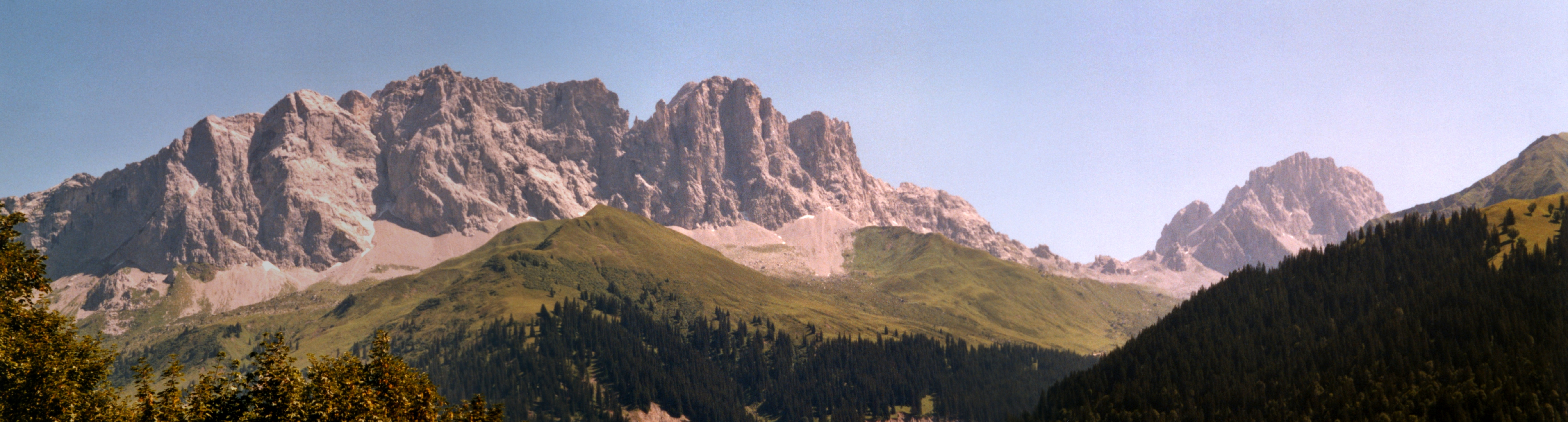 Rätikon, Drusenfluh, Drusentor, Sulzfluh, Alp Drusa